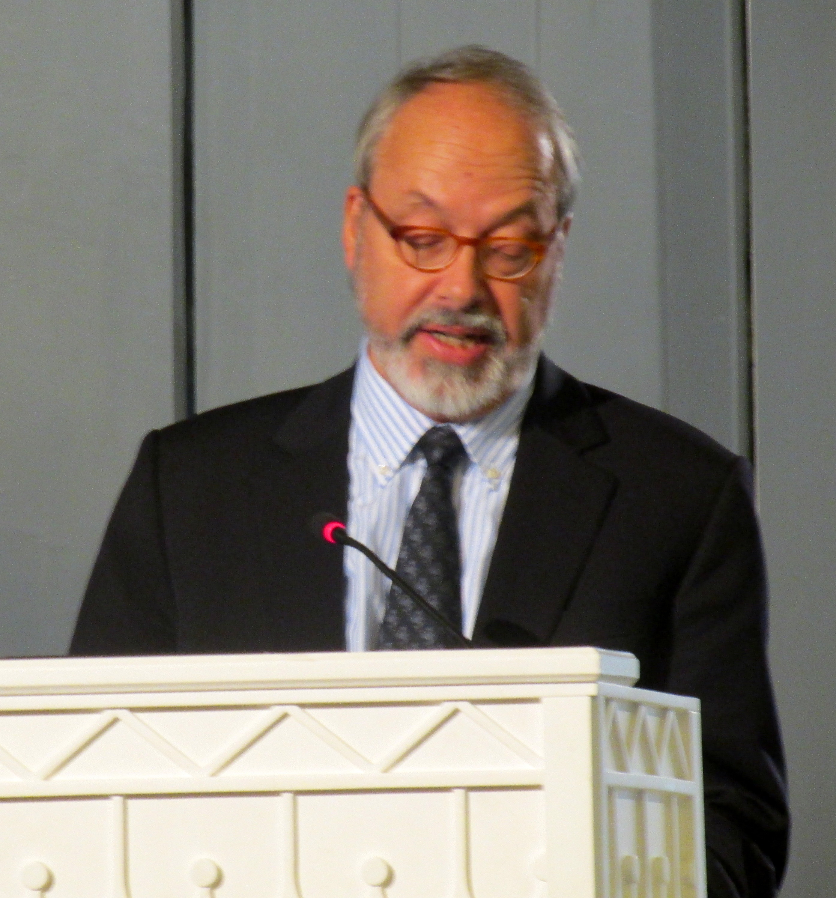 Ajaloolane ja Tartu Ülikooli audoktor Michael North esinemas seminaril „Rahvusvahelised rahvusteadused rahvusülikoolis”.